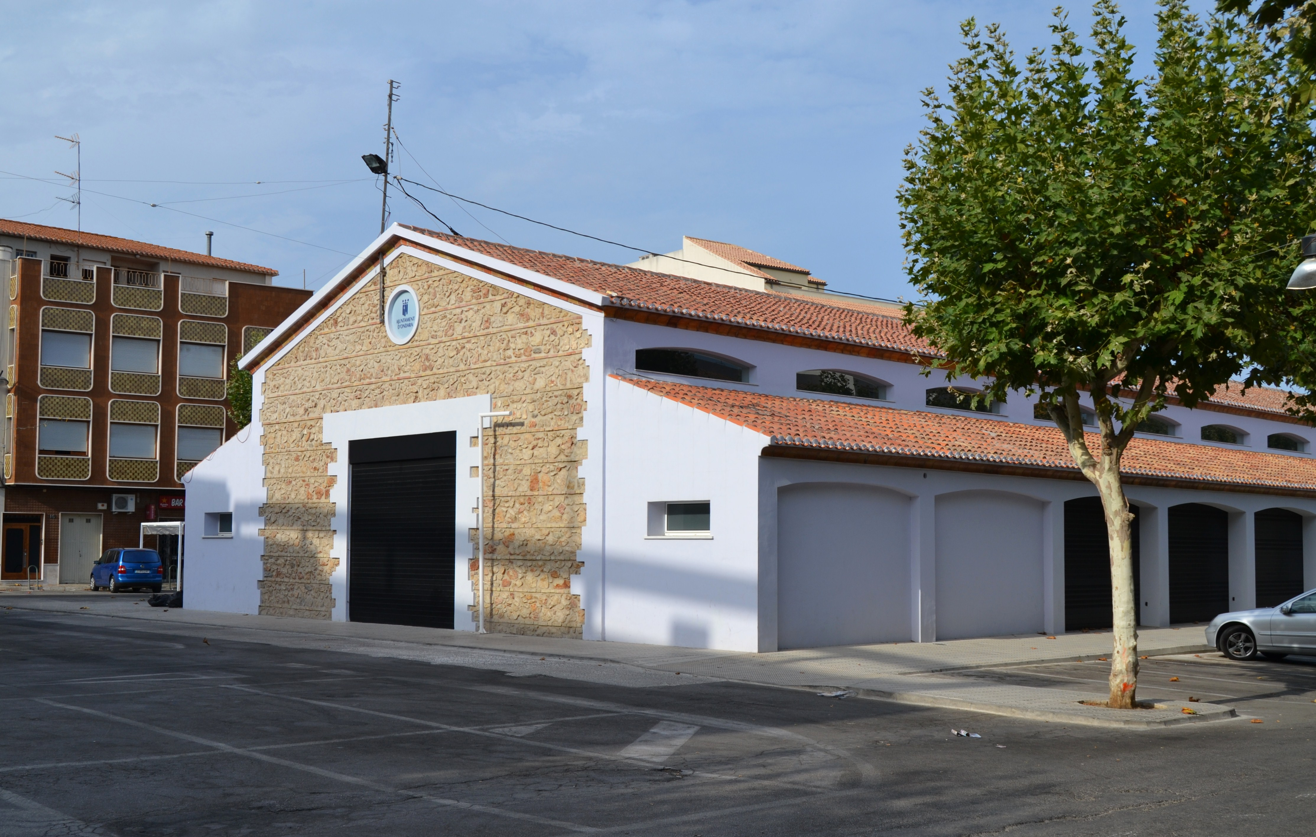 Ondara, antic mercat del Prado.